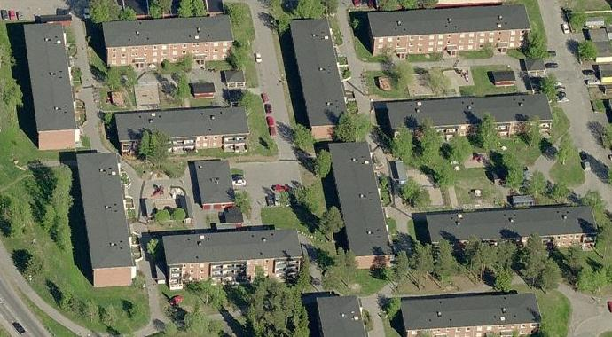 Flygbild över bebyggelse på Hertsön, Luleå.